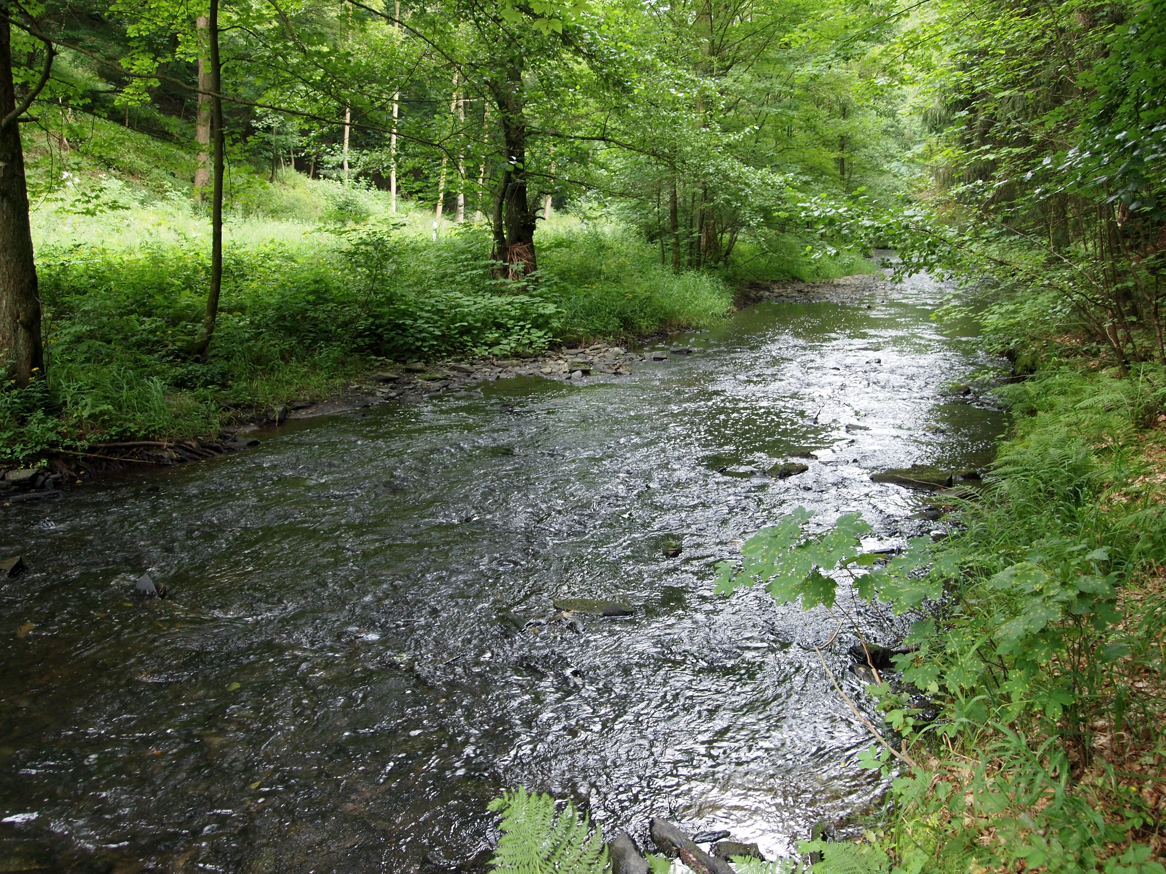 Blick von Selketal-Stieg auf die Selke nahe Mägdesprung (Stadt Harzgerode, Landkreis Harz; Sachsen-Anhalt)